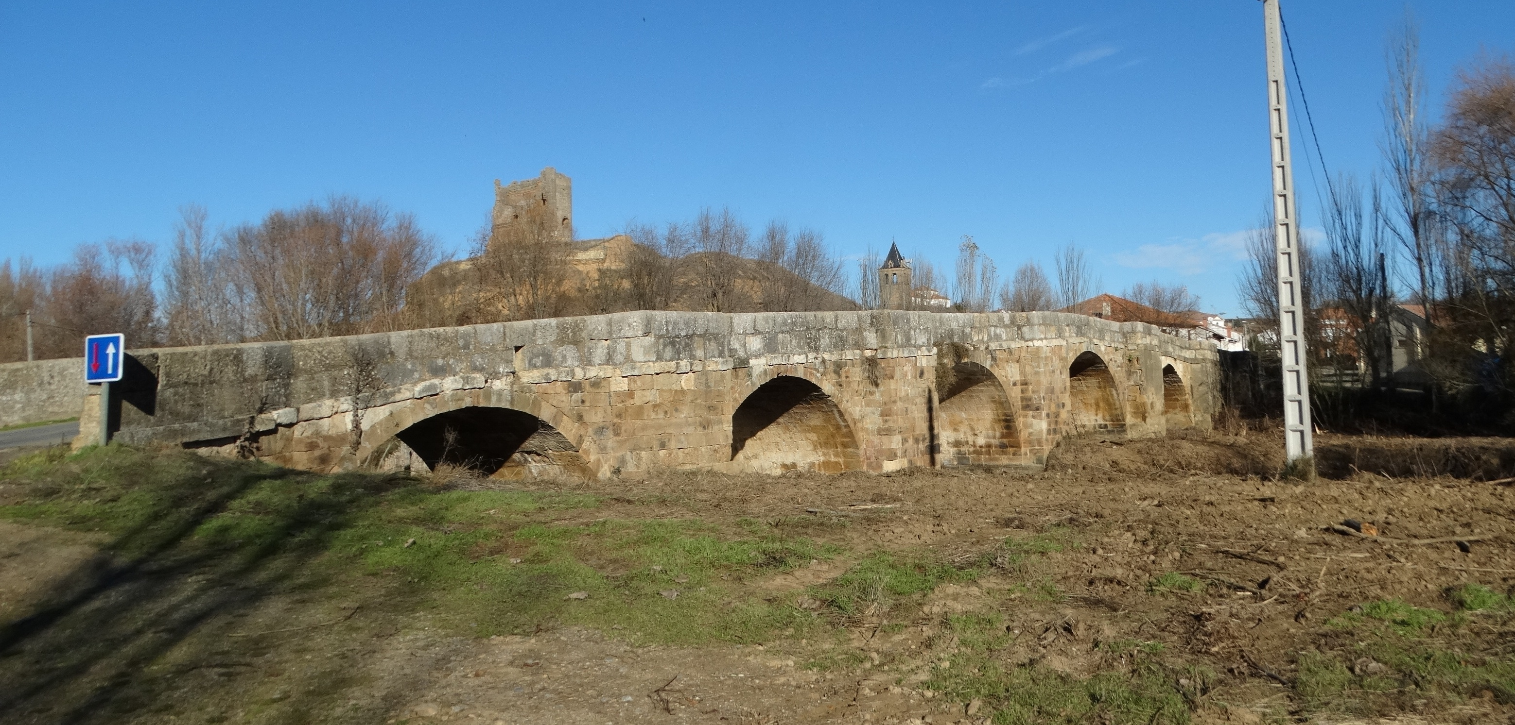 Obra civil.